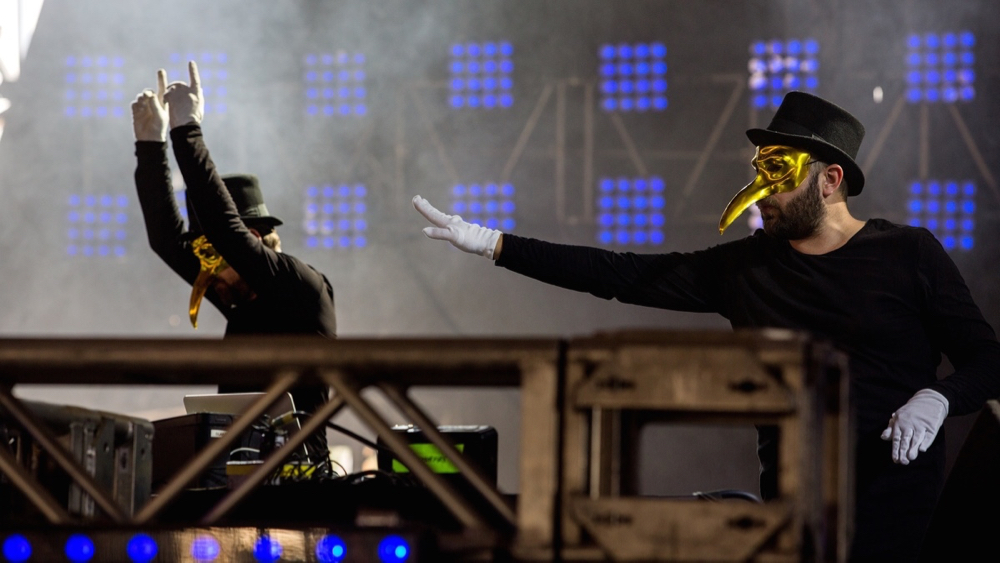 Claptone Dj